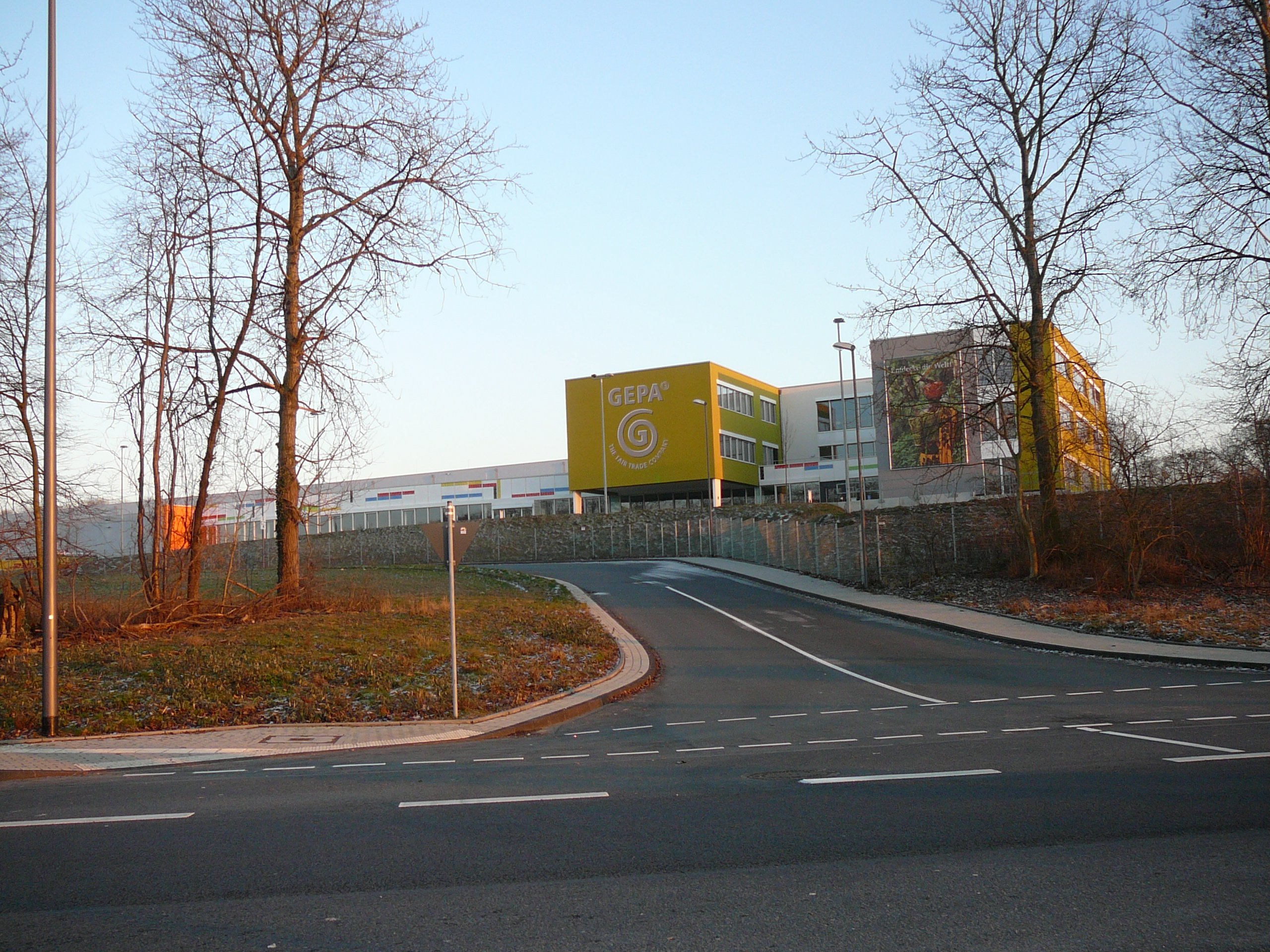 Bahnstraße, Wuppertal